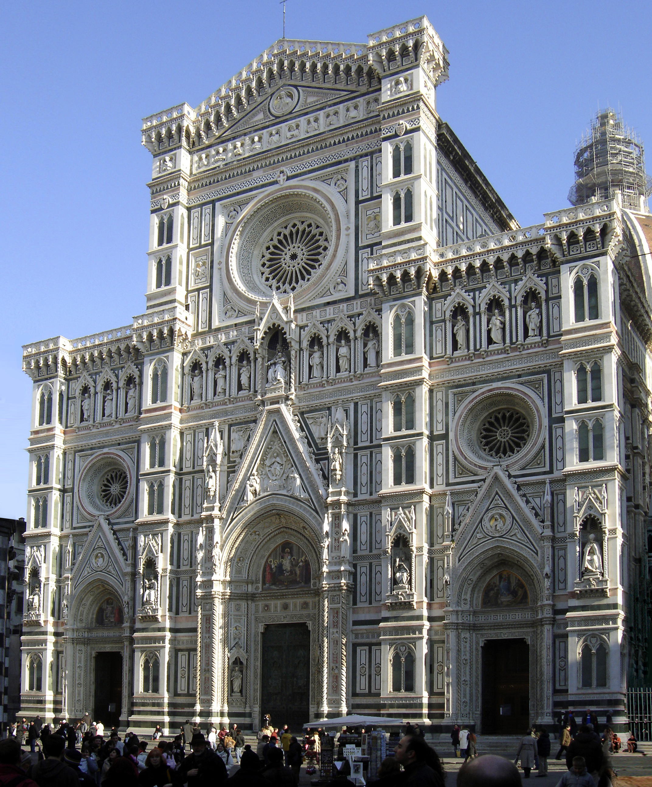 Santa Maria del Fiore, Florence